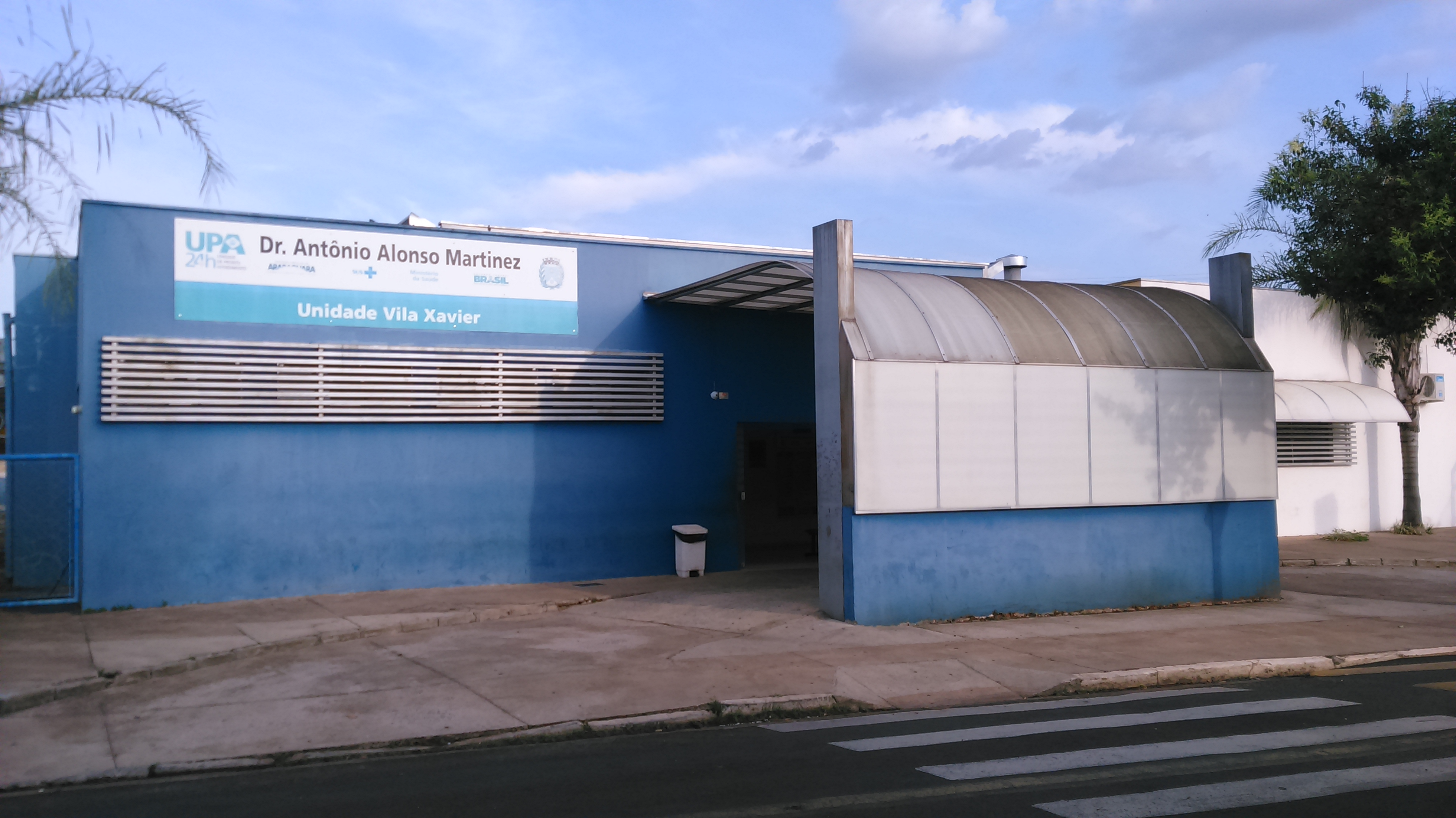 Foto evidenciando a Unidade Upa Vila Xavier com o nome aparecendo na fachada do prédio